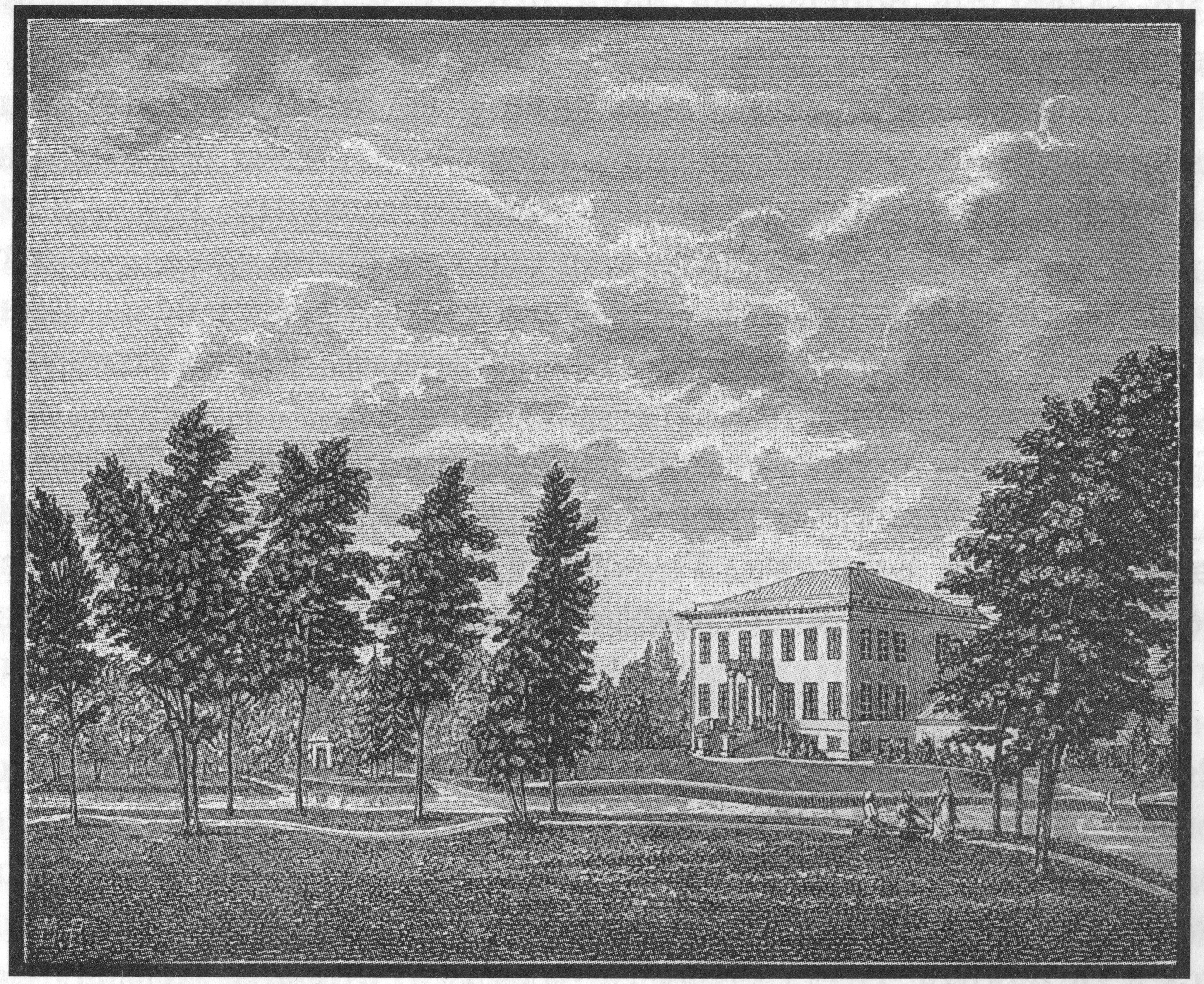 гравюра